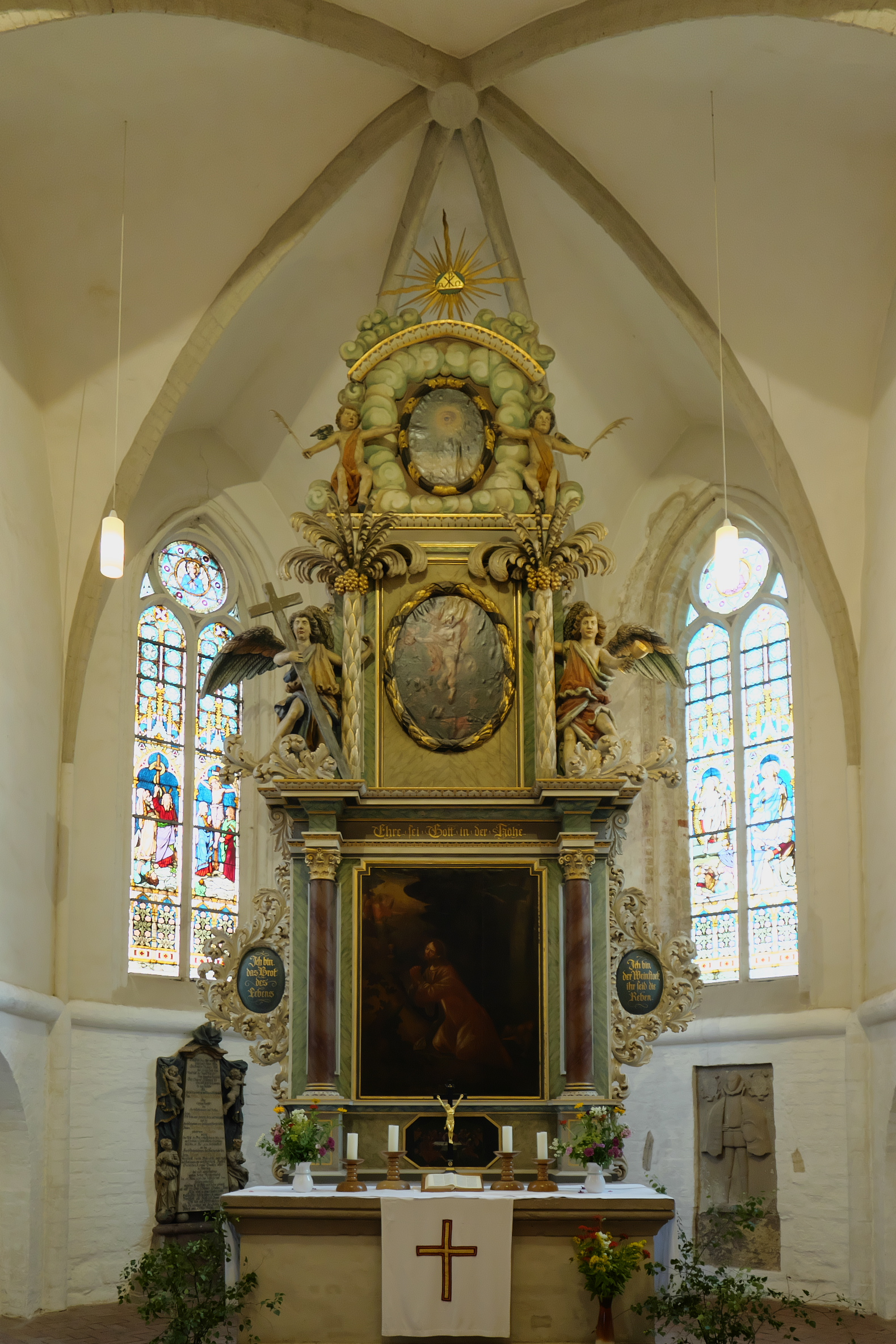 Hochaltar der Liebfrauenkirche, Jüterbog, Brandenburg, Deutschland